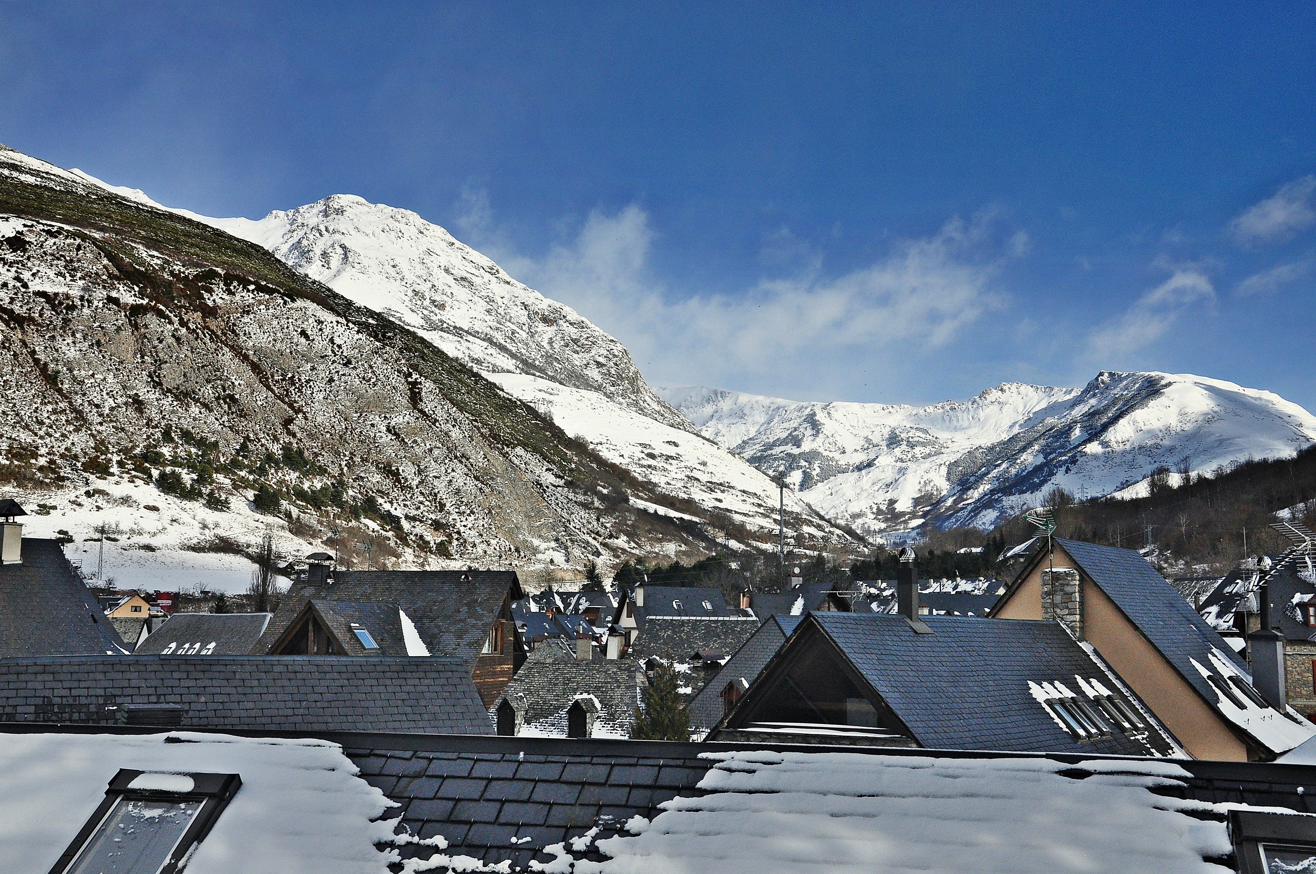 Valle de Aarna-2016